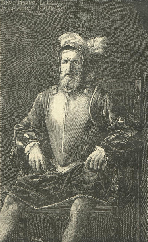 Miguel López de Legazpi, en la revista española La Hormiga de Oro.